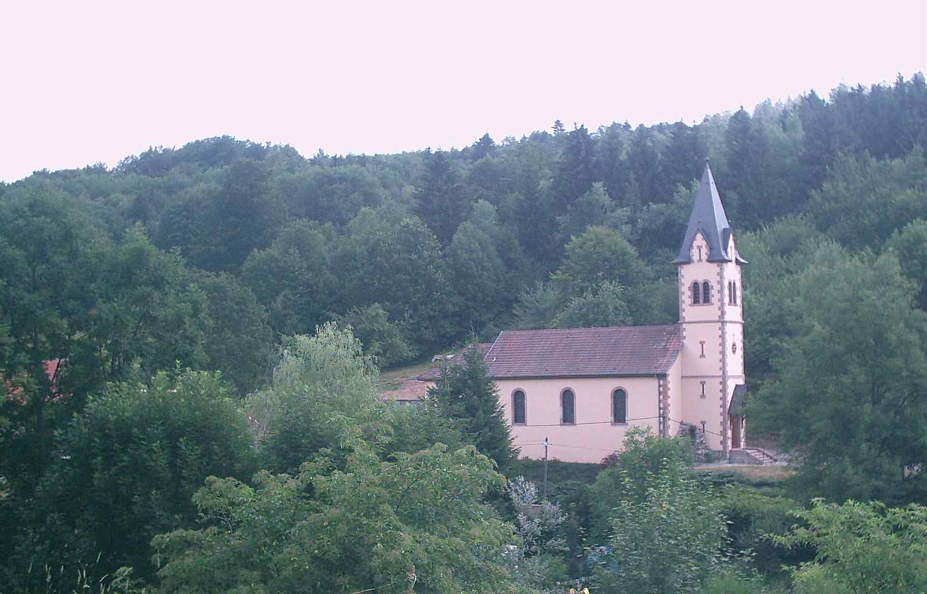 Kirche von Blancherupt